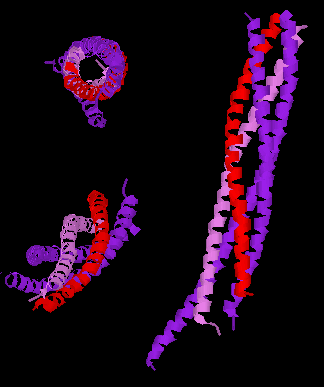 3 verschiedene Ansichten der Struktur eines abgekürzten neuronalen SNARE Komplexes. Legende: Synaptobrevin-2 (rot), Syntaxin-1 (rosa), SNAP-25 (violett). Weitere Darstellungen aus der Proteindatenbank